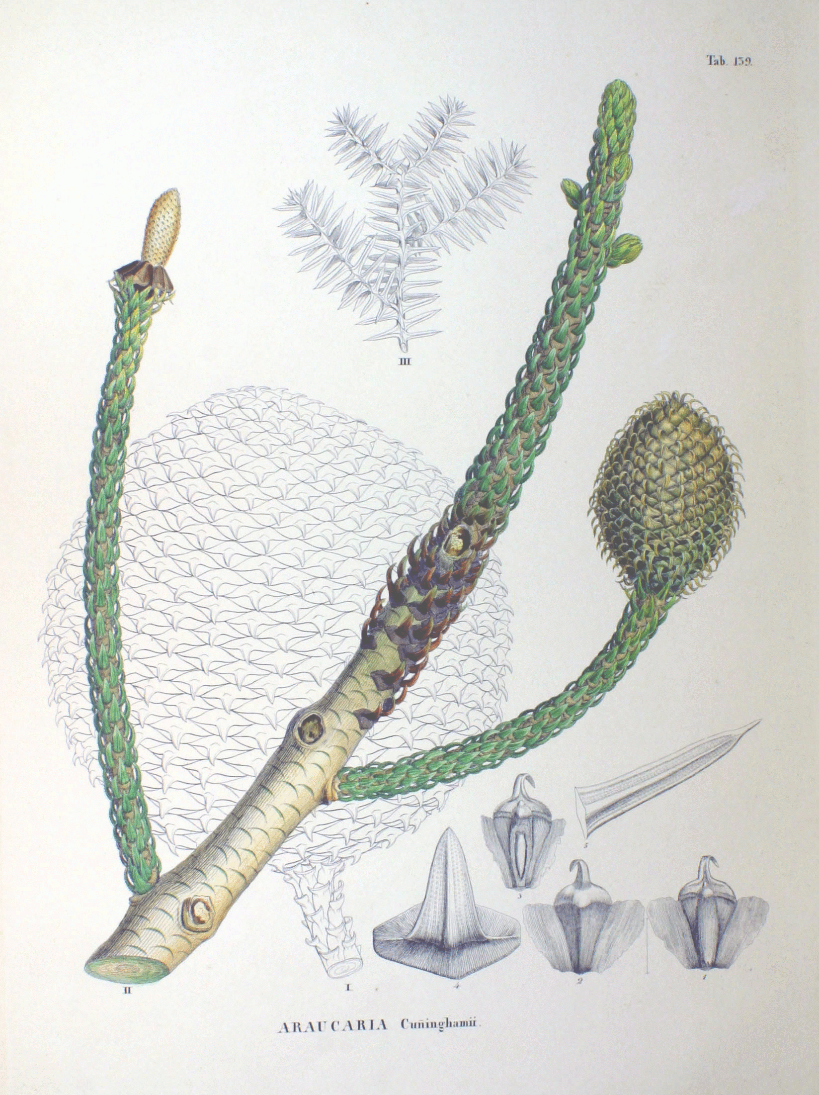 Araucaria cunninghamii Plate from book